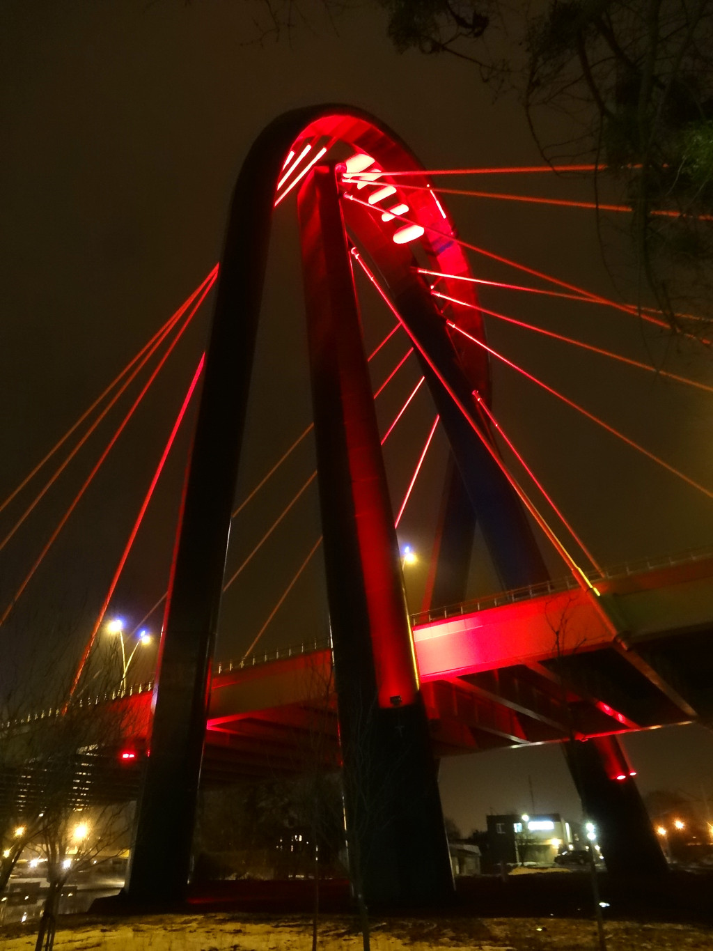 Pylon Trasy Uniwersyteckiej w Bydgoszczy nocą